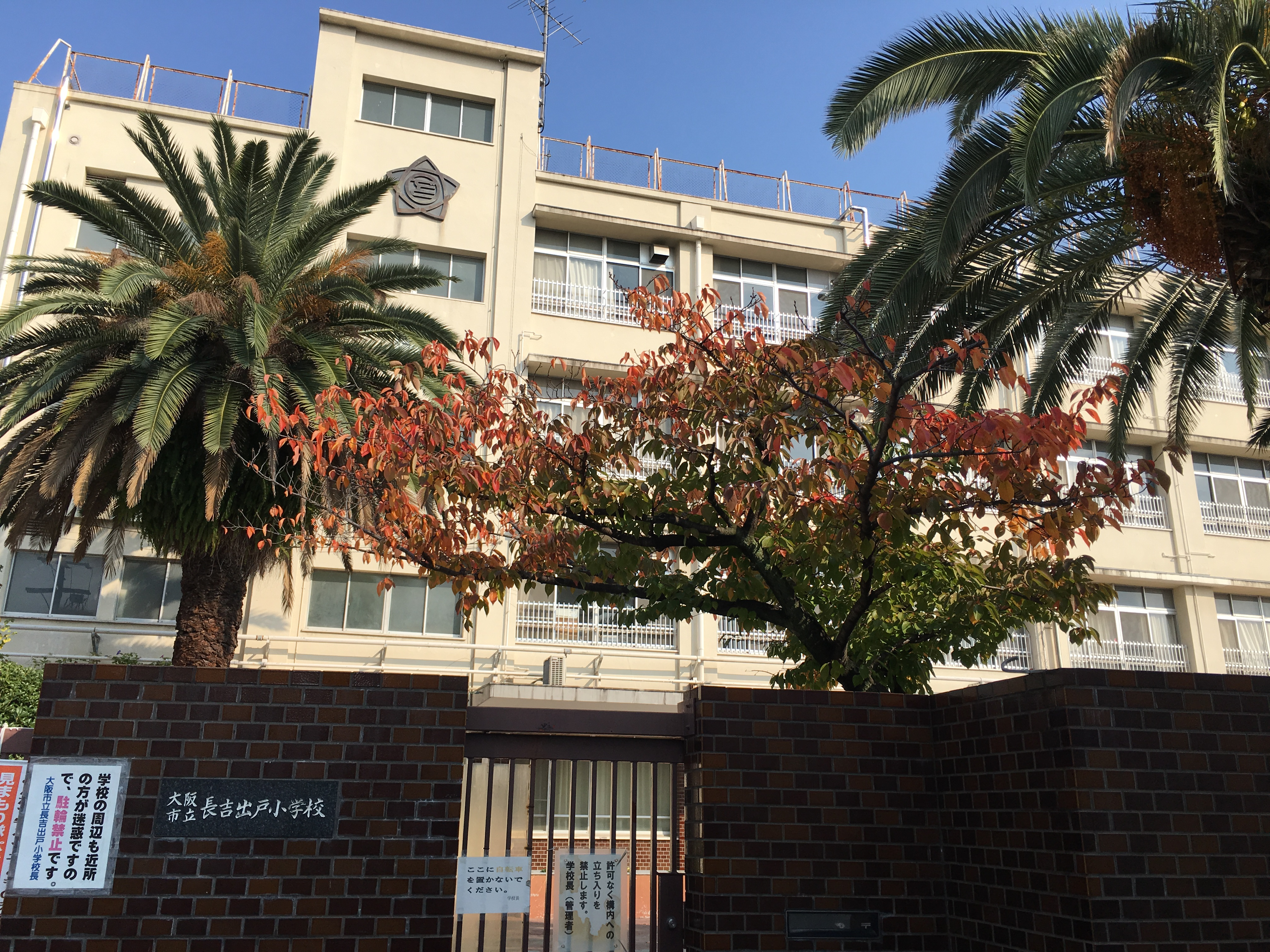 長吉出戸小学校